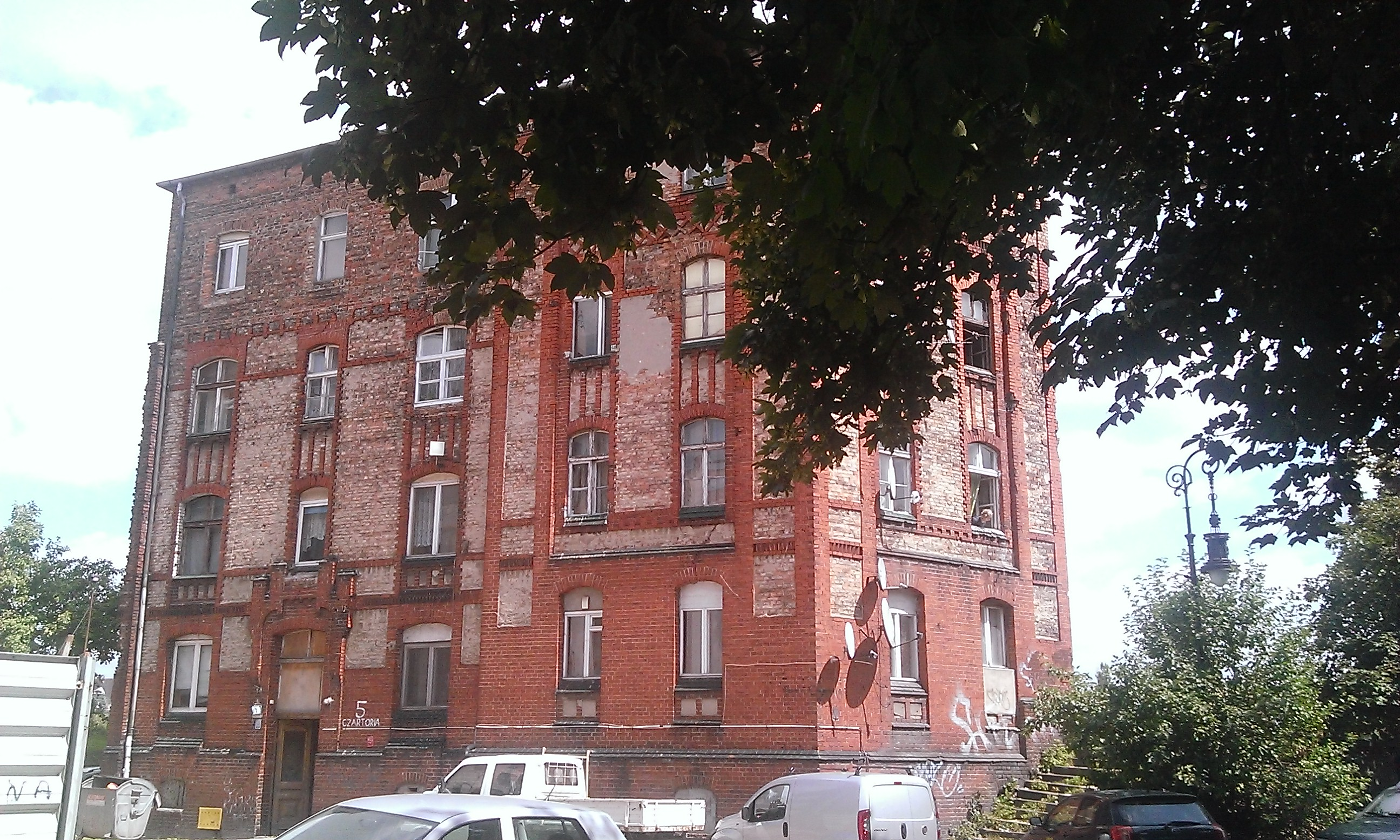 Chwaliszewo lipiec 2013